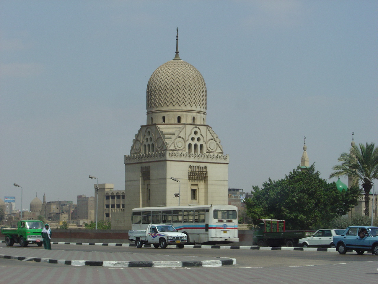 Mosque in Cairo, Egypt.